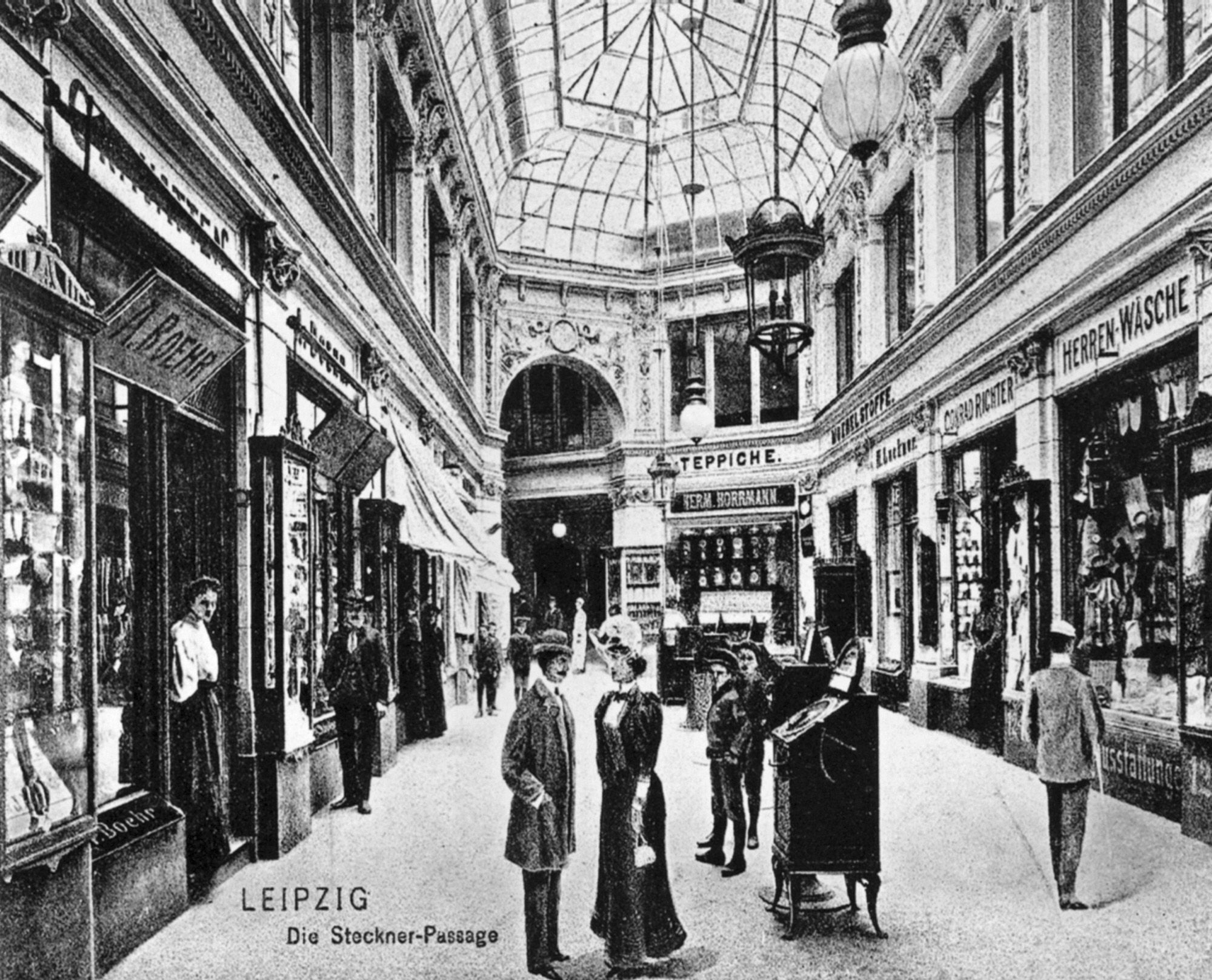 In der ehemaligen Steckner-Passage in Leipzig